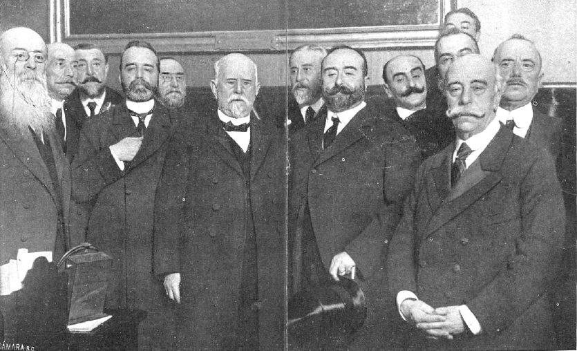 Los líderes del Partido Conservador a la salida de la asamblea de parlamentarios del partido celebrada en el Senado el 8 de enero de 1913 en la que se pidió a Antonio Maura que no abandonara la jefatura del partido. Están presentes Alejandro Pidal, Eduardo Dato, José Sánchez Guerra, Marcelo Azcárraga, Juan de la Cierva y el marqués de Pidal.